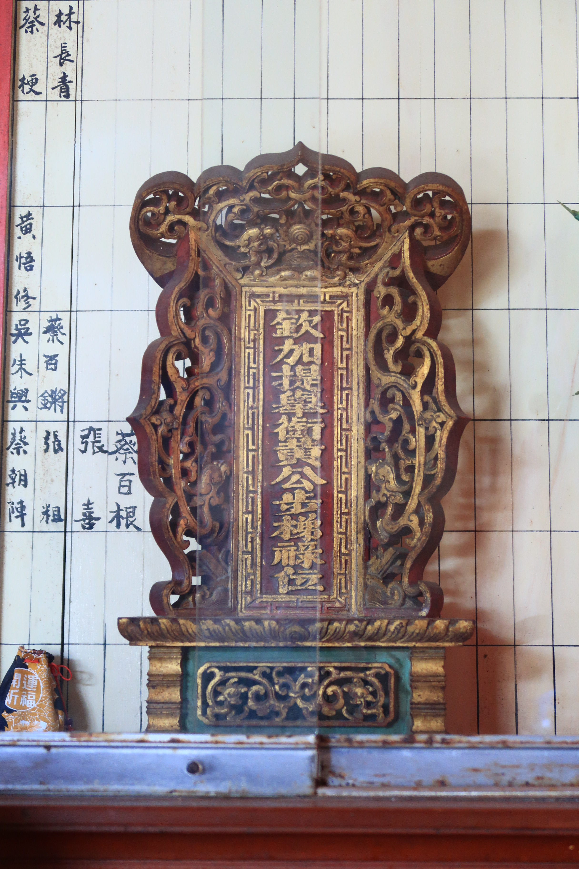 黃步梯，又名黃烈侯。澎湖媽宮澳人。初充澎湖協稿識，習營務，補安平右營額外外委，遷把總。同治間，戴潮春事起，步梯從參將陳國銓為總兵林向榮運餉，以功加五品銜。旋以母老辭歸，澎湖協鎮張顯貴重其才，延入幕。後援例為通判，加提舉銜。既家居，凡里中義舉，知無不為，曾與蔡玉成修文石書院，勸捐監工，寒暑無間；欲重修城隍廟未果而卒。